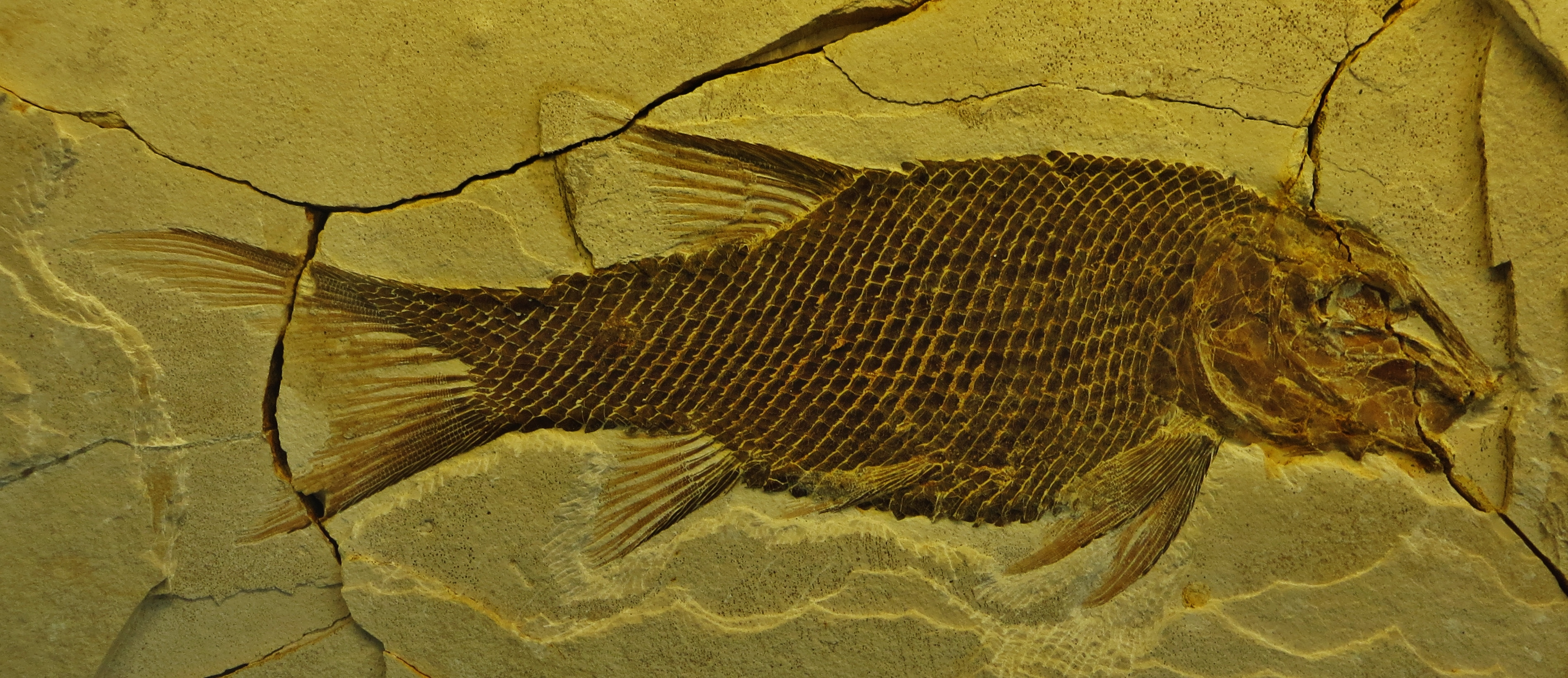 Took the picture at Jura-Museum, Eichstaett